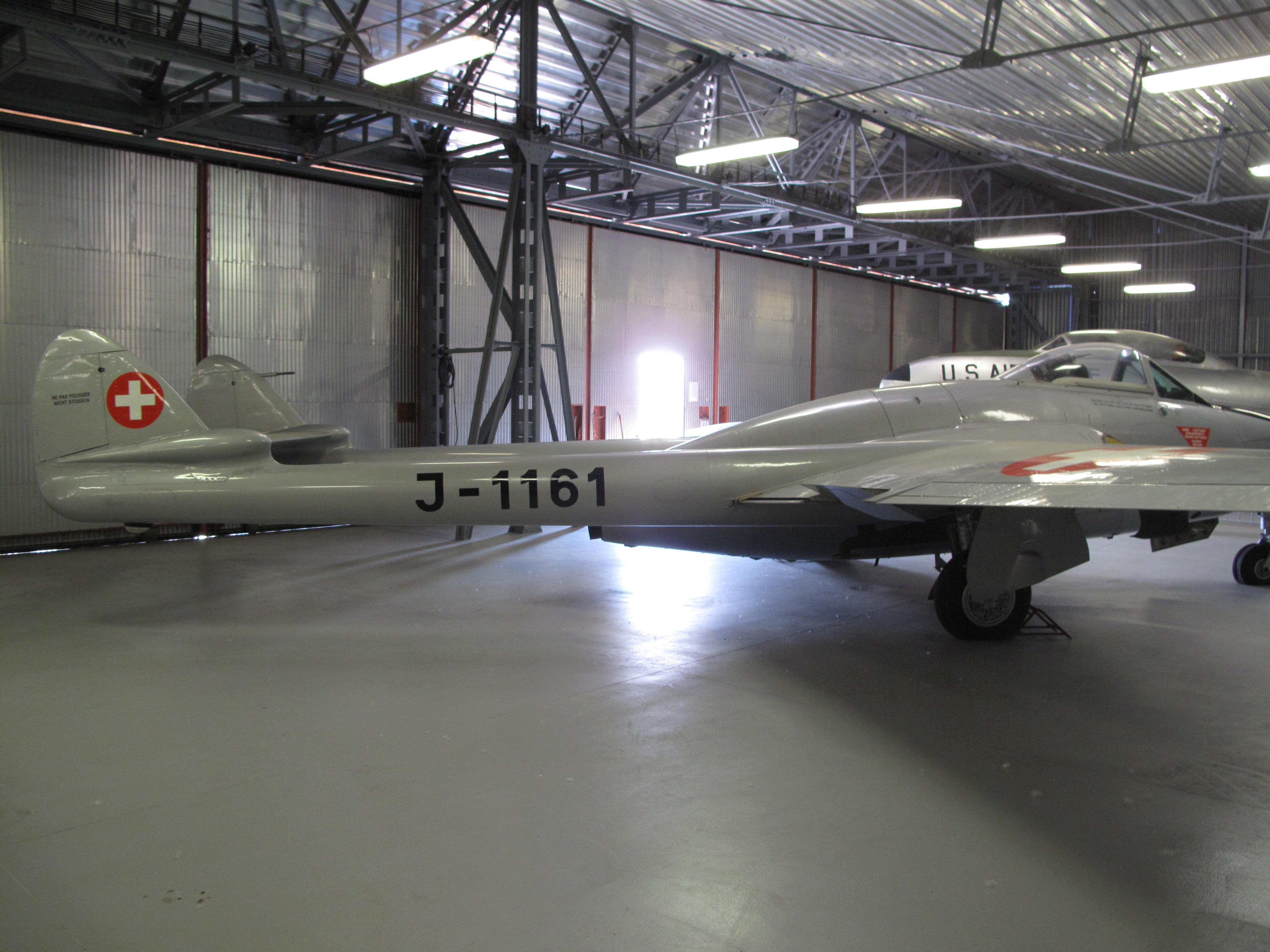 Letecké muzeum Kbely